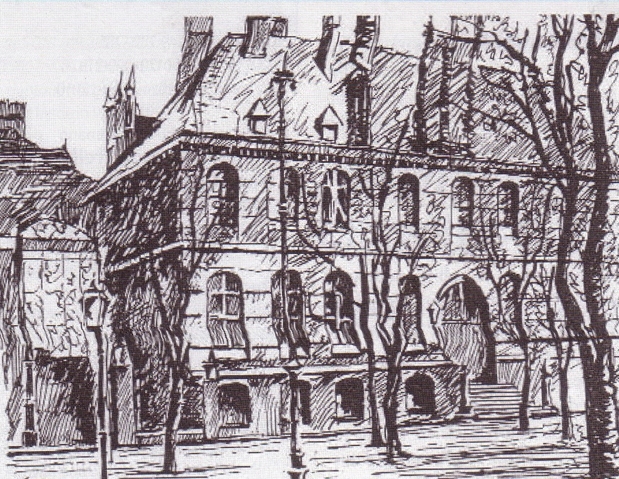 Zeichnung der neuen Chirurgischen Universitätsklinik in Breslau